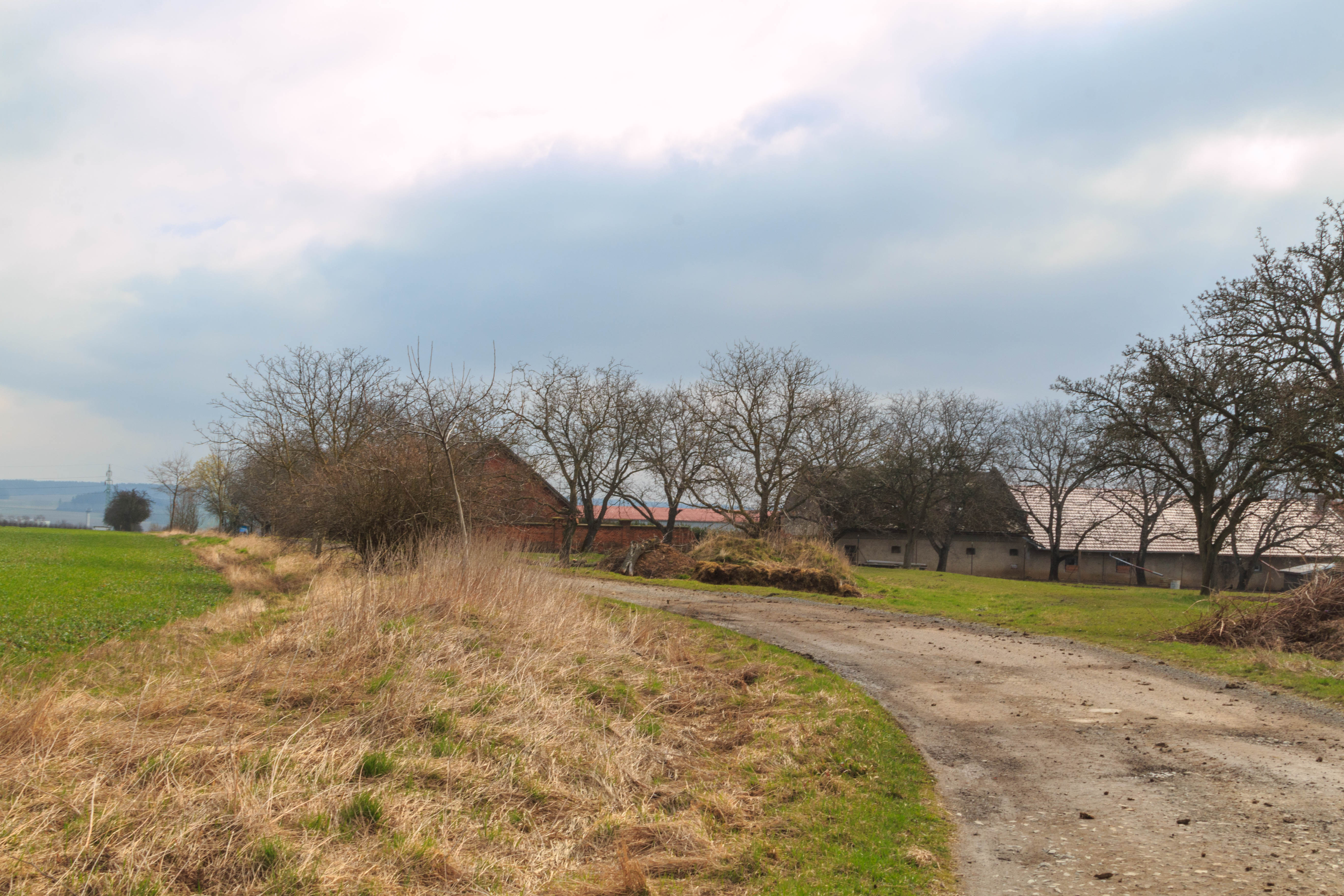 Rychnovská Lhotka při příjezdu od Jedliny